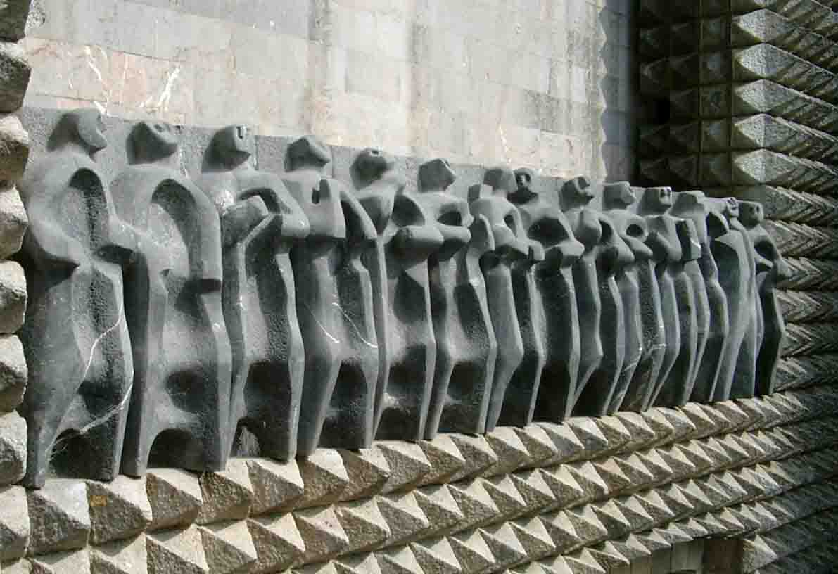 Irudia/Image: oteizaren "apostoluak" eskultura Arantzazun (Oñati, Gipuzkoa) Argazkilaria/Photographer: Josu Goñi Etxabe